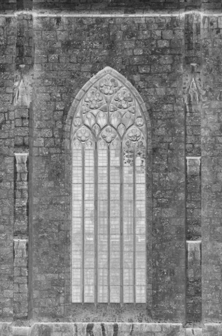 Klášter Neuberg